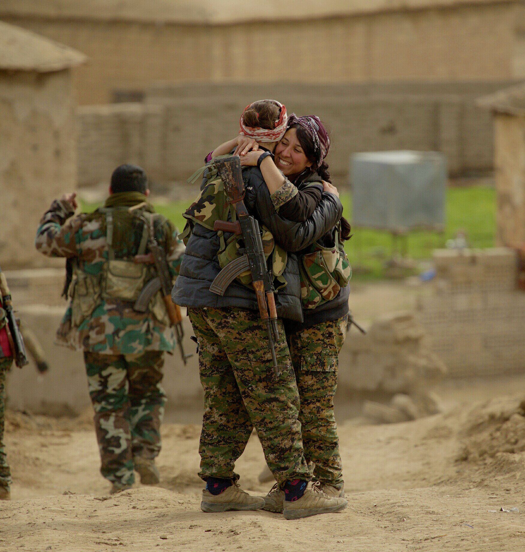 Kurdish YPG Fighters